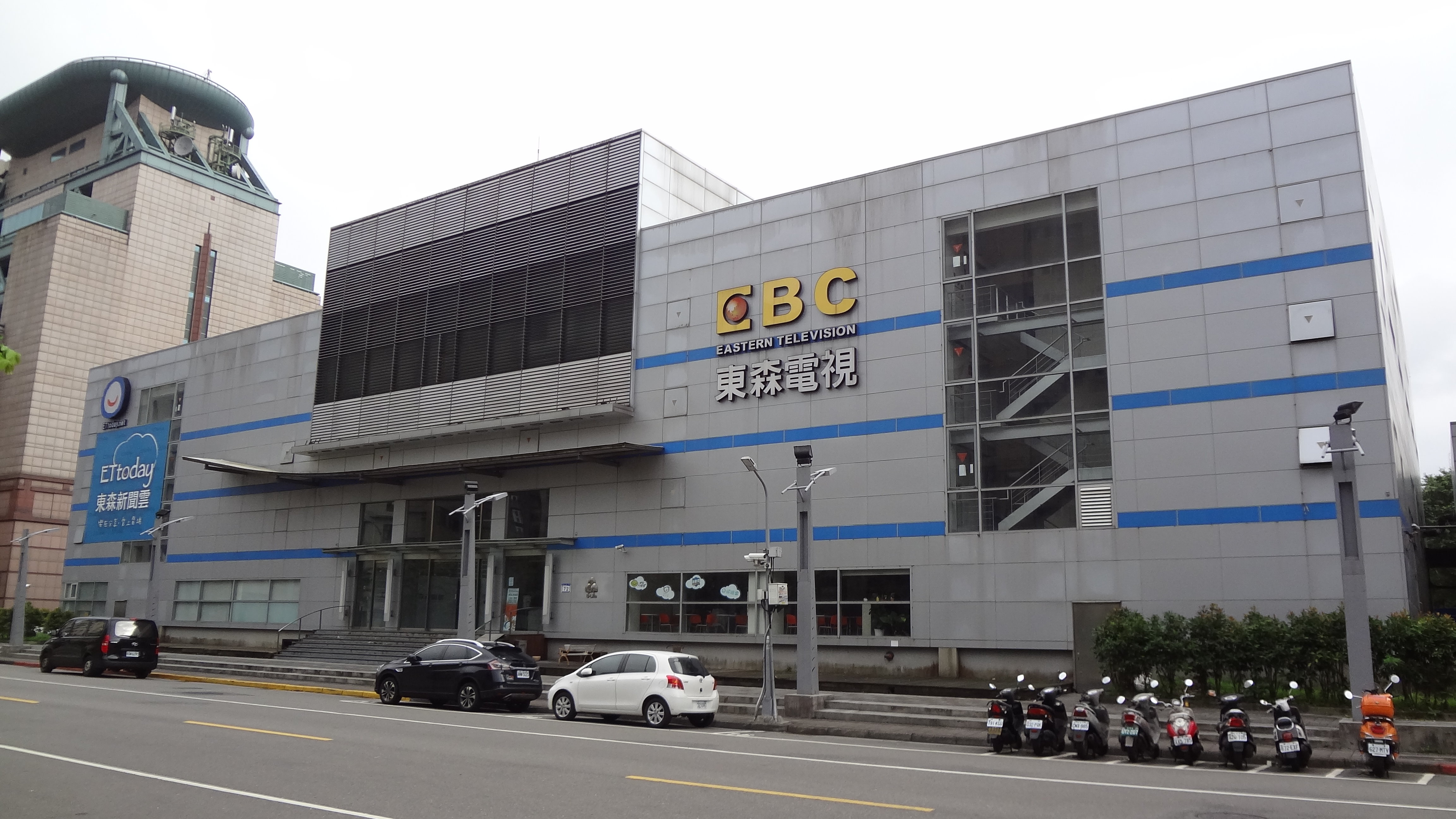 東森新聞雲南港辦公室與東森電視南港攝影棚，原森森百貨總部，位於臺北市南港區重陽路72號。